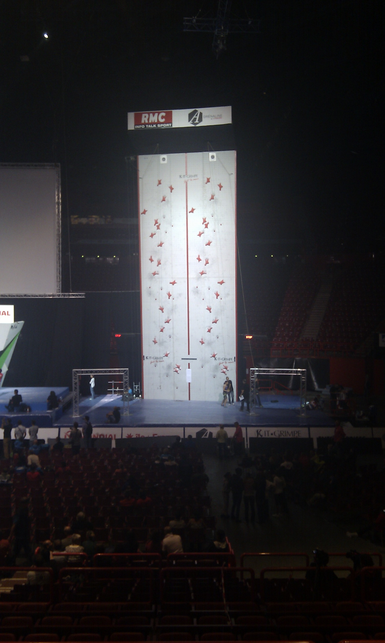 Mur de vitesse lors des championnats du monde d'escalade 2012 à Paris Bercy.